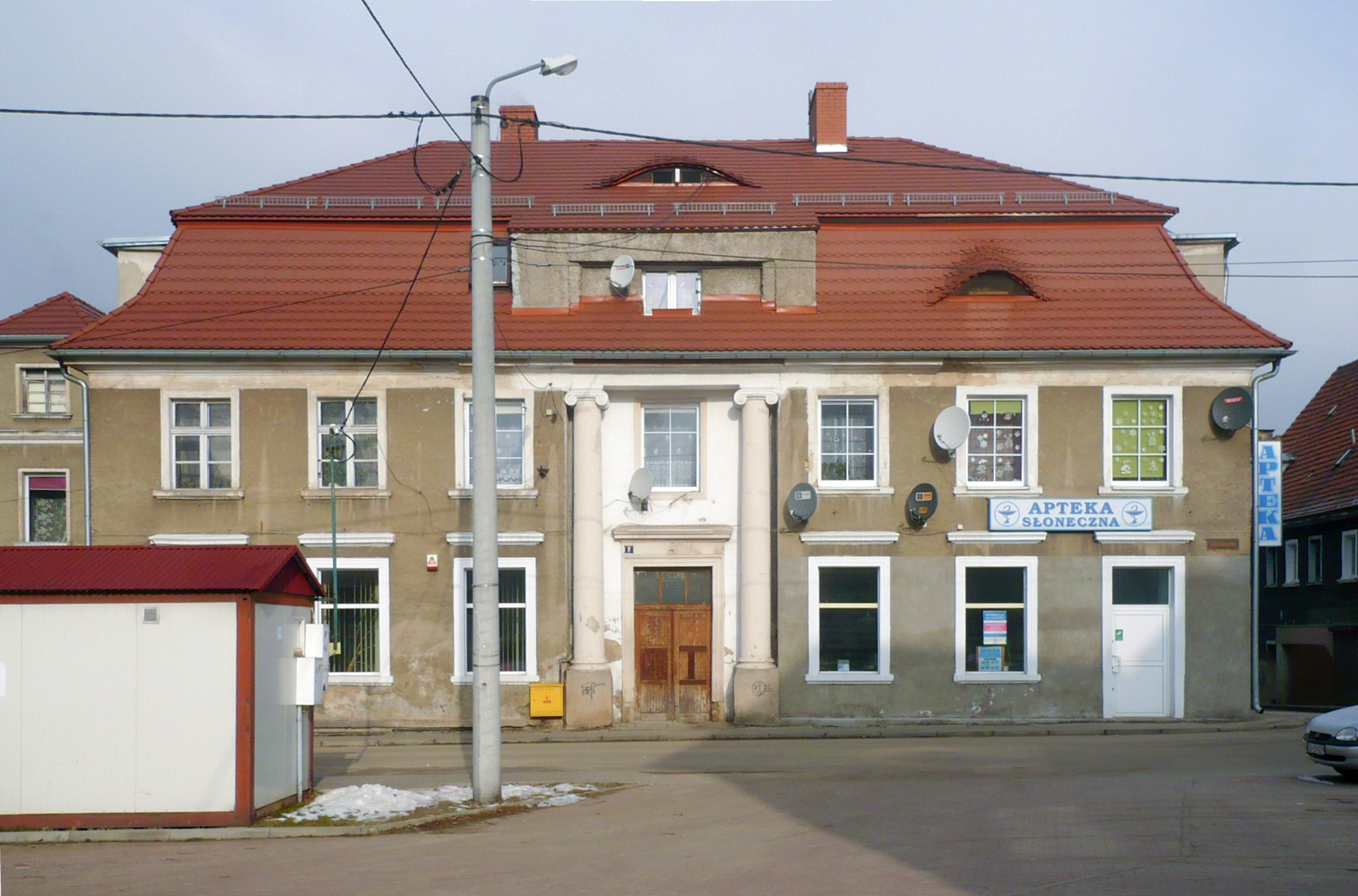 Walim, dom z portykiem jońskim, ul. Konopnickiej 2 (dawniej: ul. Dymitrowa 1), z końca XVIII w., początek XX w.